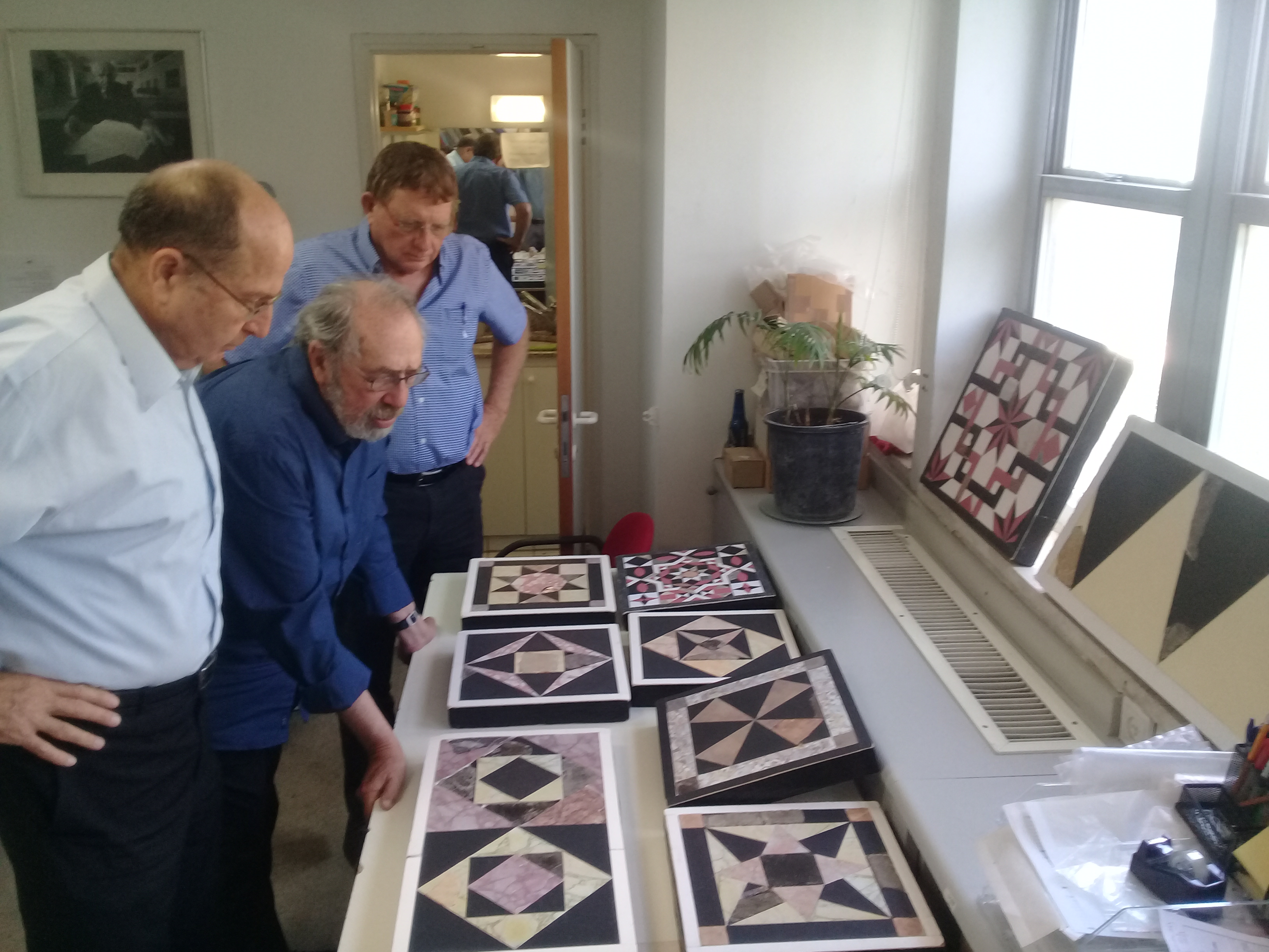 הארכאולוג גבריאל ברקאי עם משה בוגי יעלון, התמונה צולמה במעבדת המחקר של מיזם סינון העפר מהר הבית. גבי ברקאי מציג למשה יעלון את שחזורי הרצפות של רחבת בית המקדש.